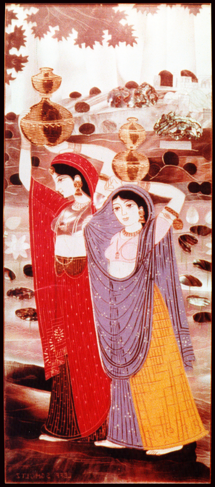 копия инкрустации Л. Шульца "Жаркий полдень". 1950-е